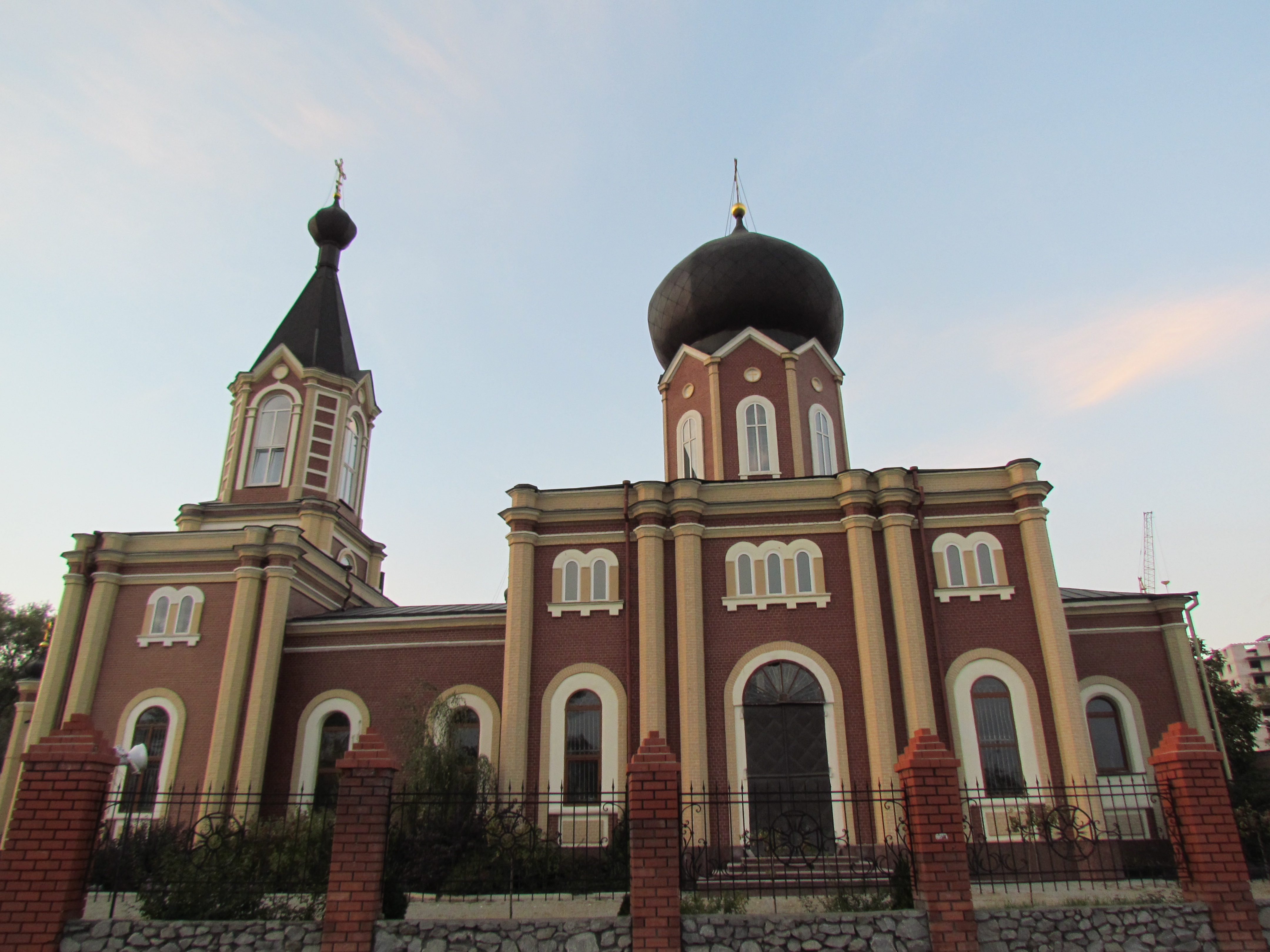 Україна, Харків, вул. Шевченка, 119